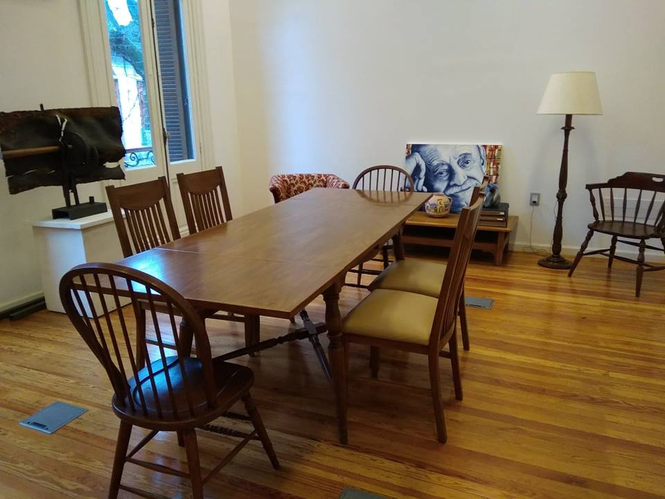 Sala del Consejo de la Fundación Benedetti, con muebles del antiguo comedor del poeta.